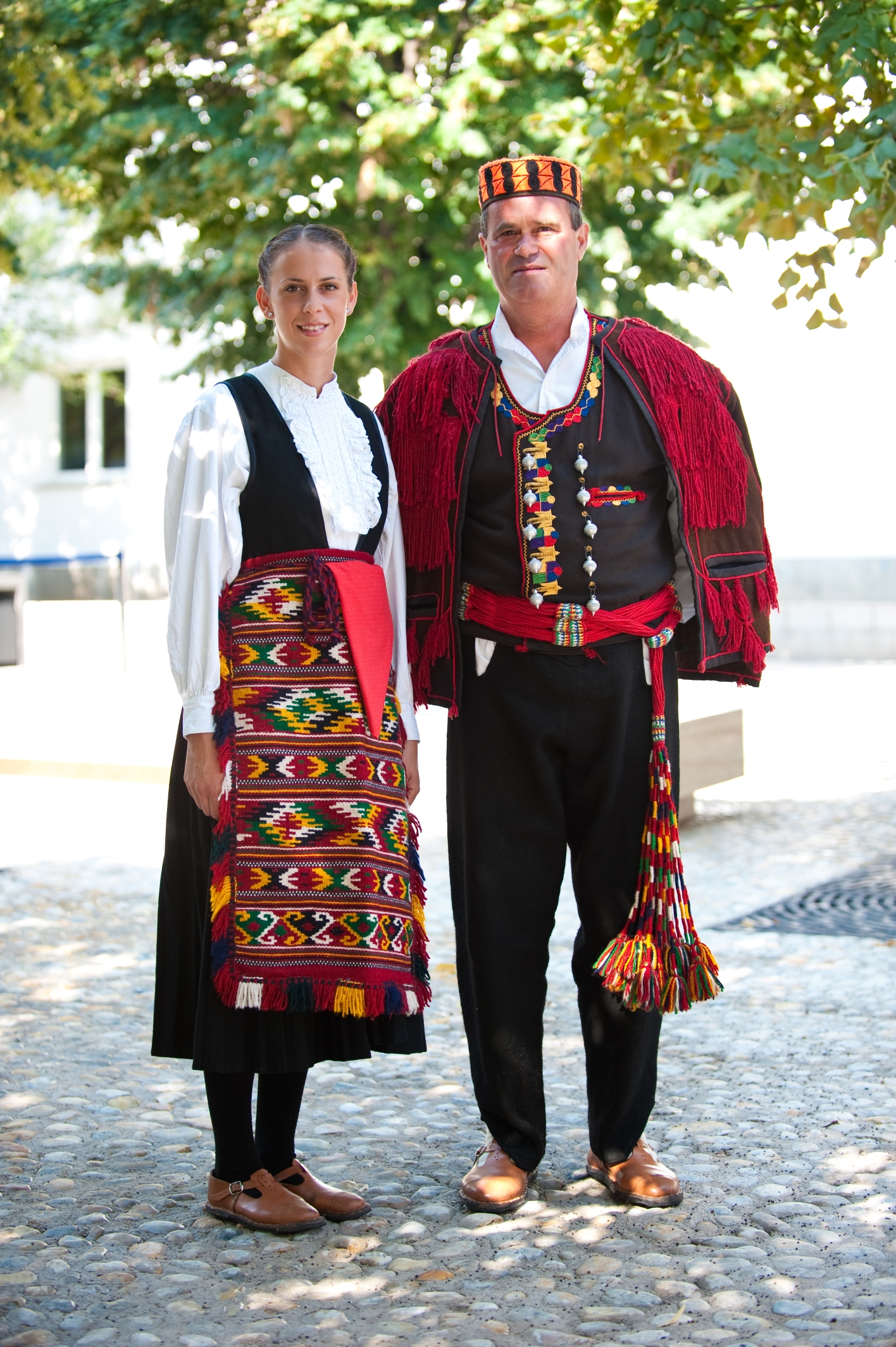 Miljevačka nošnja